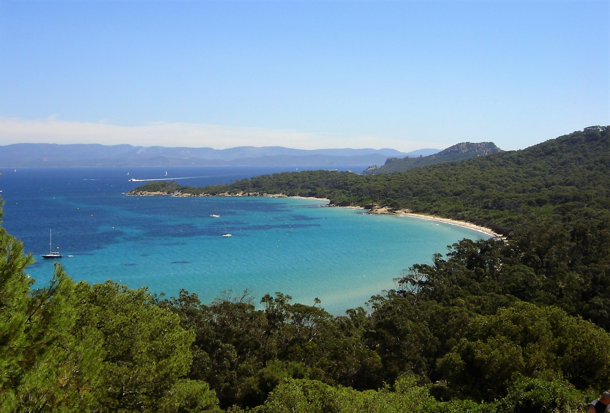 Vue de la côte de l'île de Porquerolles au niveau de la plage de la Courtade.